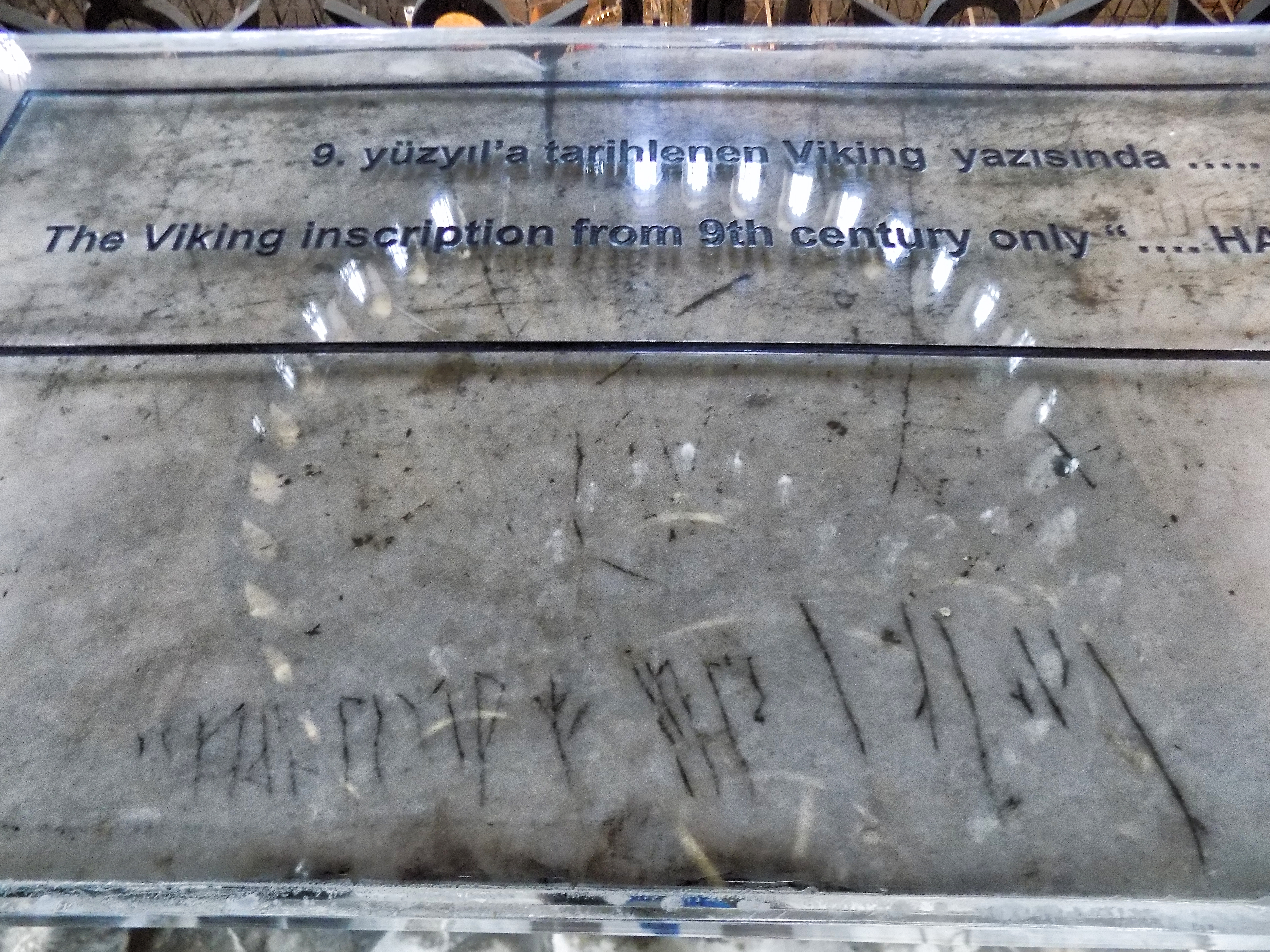 Ayasofya'nın üst galerisinde yer alan ve 9. yüzyıla tarihlenen Viking runik yazısı ile yazılan "Halvdan buradaydı" yazısı.